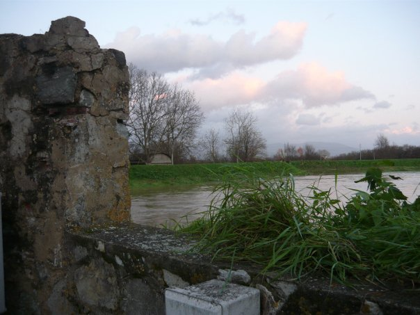 L'Ombrone Pistoiese a Ponte al Mulino di Poggio a Caiano, durante la piena di Natale 2009